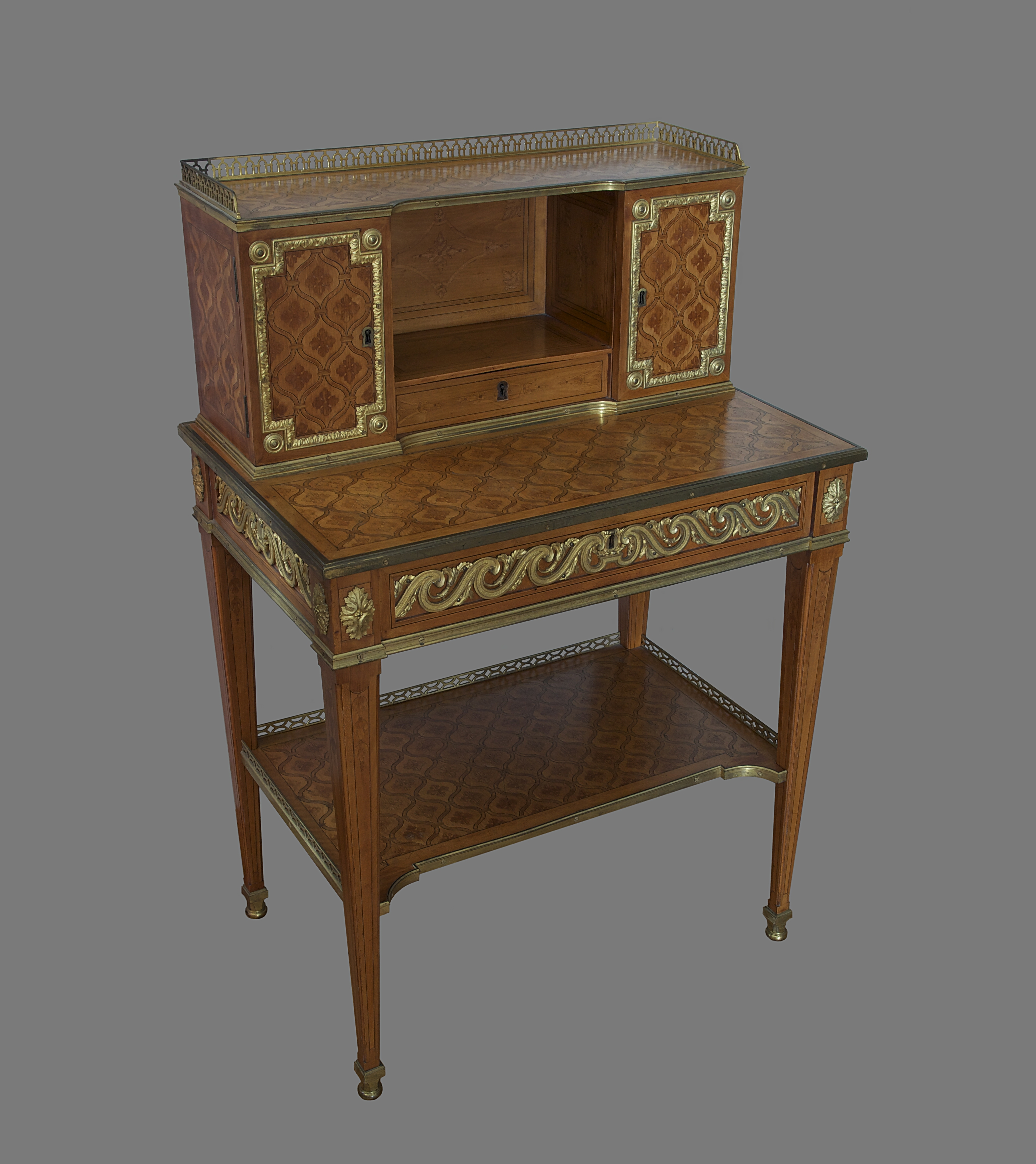 Petit secrétaire à gradin